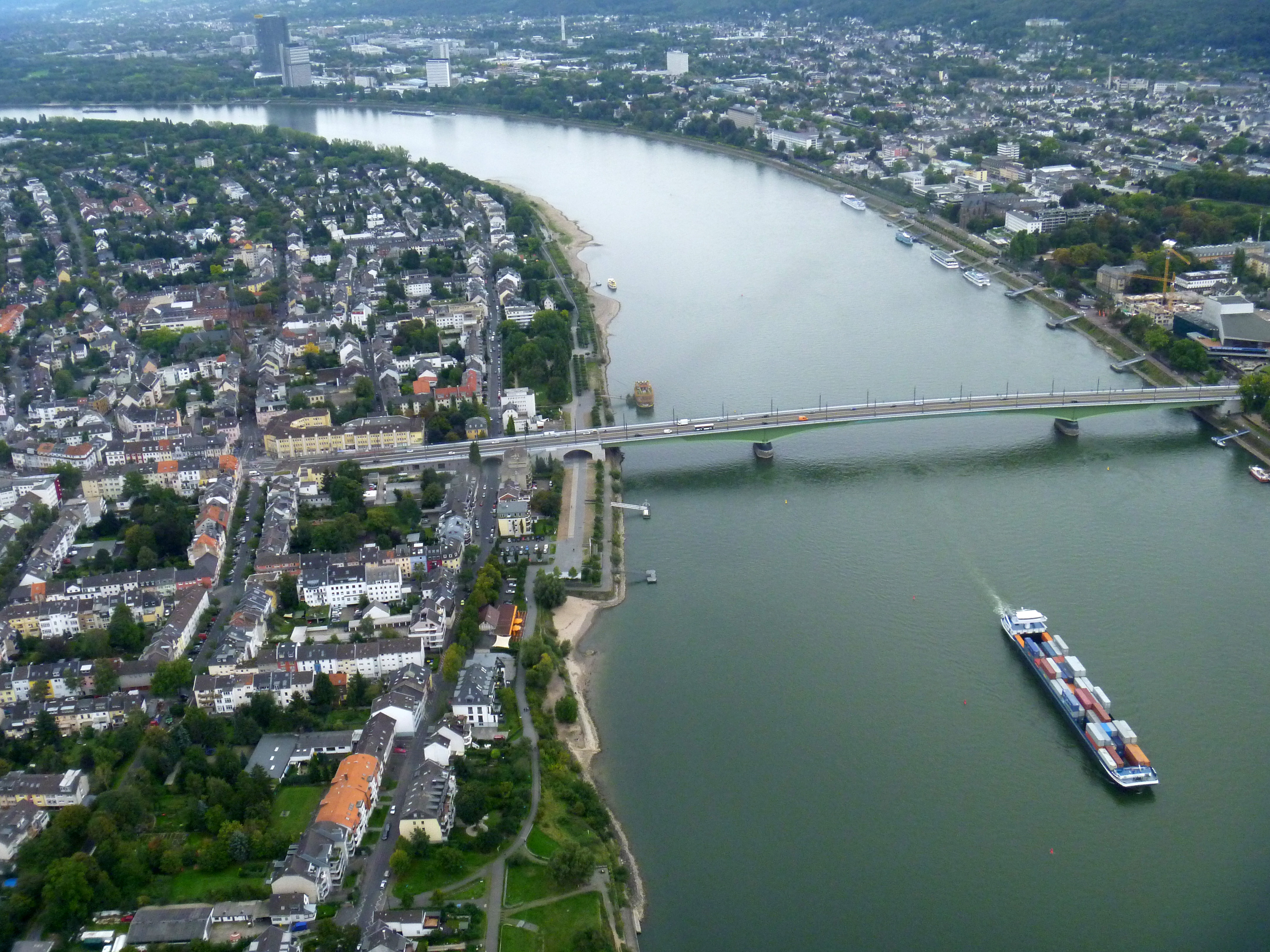 Luftaufnahme der Kennedybrücke in Bonn